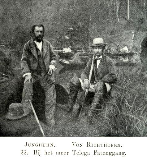 Junghuhn und von Richthofen am See Telaga Patengan